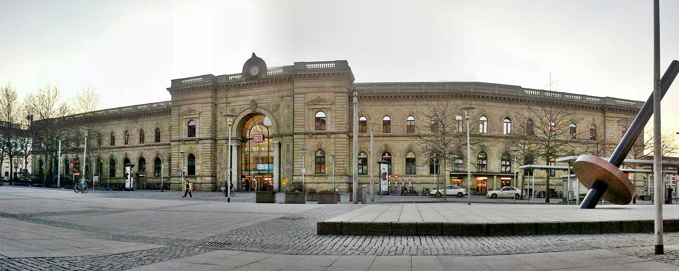 Panorama des Hauptbahnhofes Magdeburg